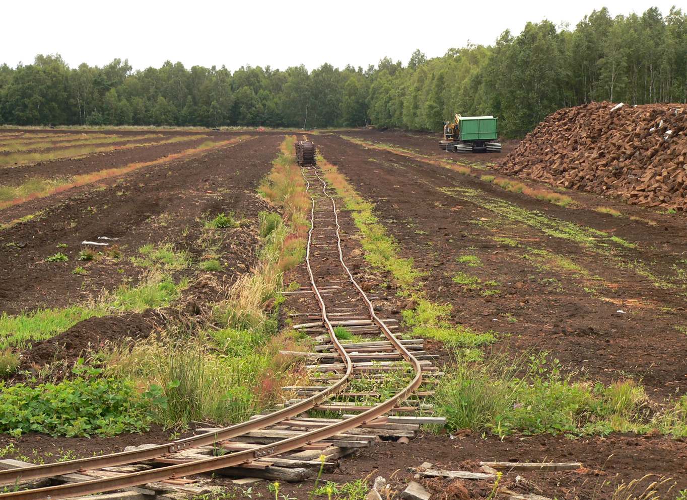 Torfbahn im Aschener Moor